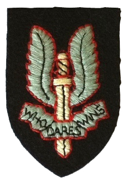 Insigne de béret SAS en tissu porté notamment par les SAS français du 3rd et 4th SAS lors de la seconde guerre mondiale.